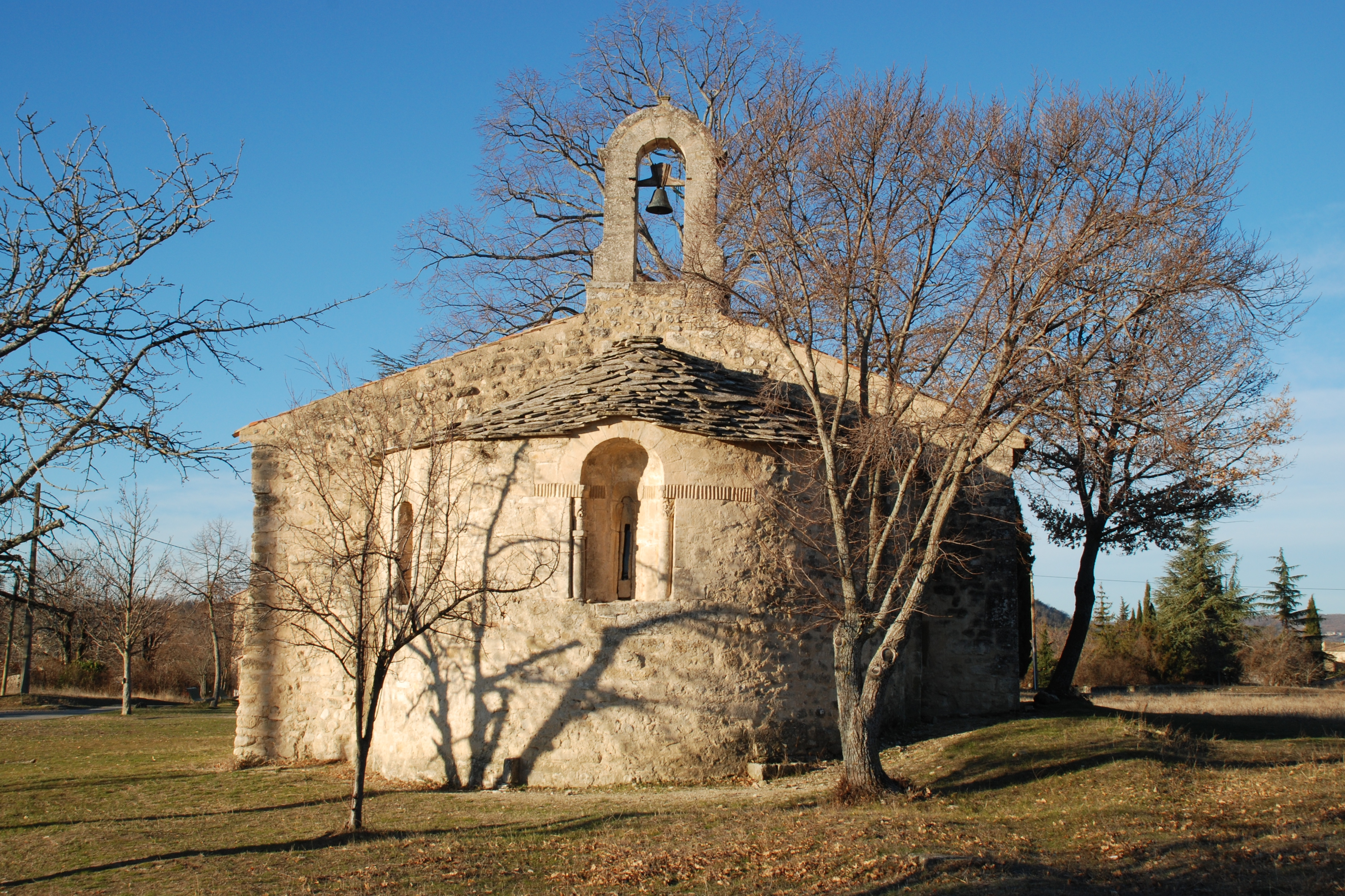 France - Provence - Chapelle Saint-Pierre de Pierrerue